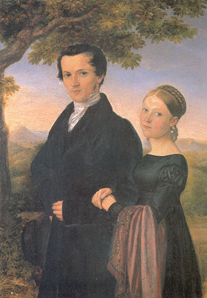 Komponist Friedrich Silcher (1789-1860) mit seiner Braut